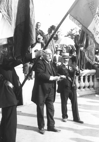 Photographie de Joseph Sansboeuf prononçant un discours